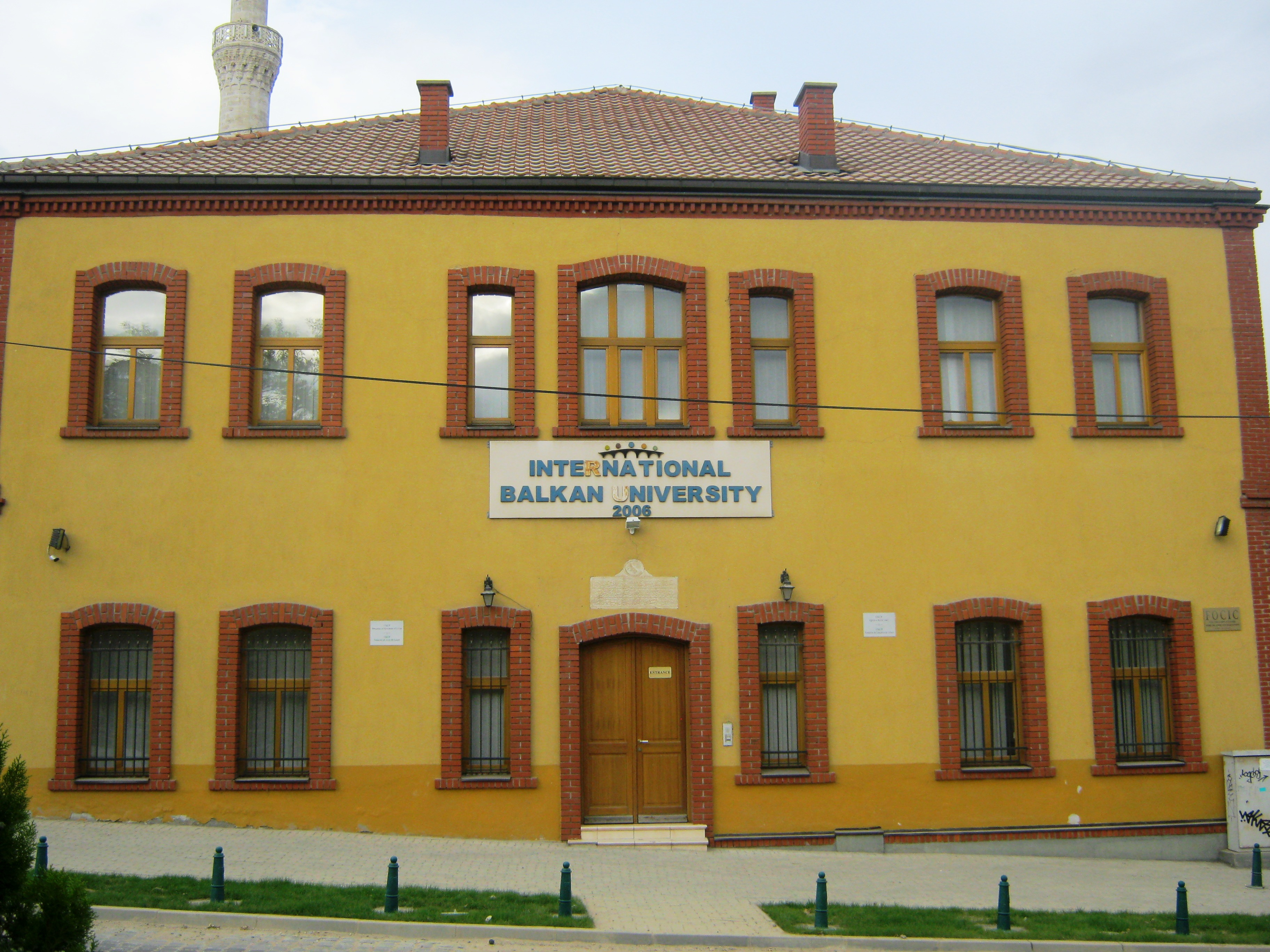 Зграда на Старата турска пошта во Скопје